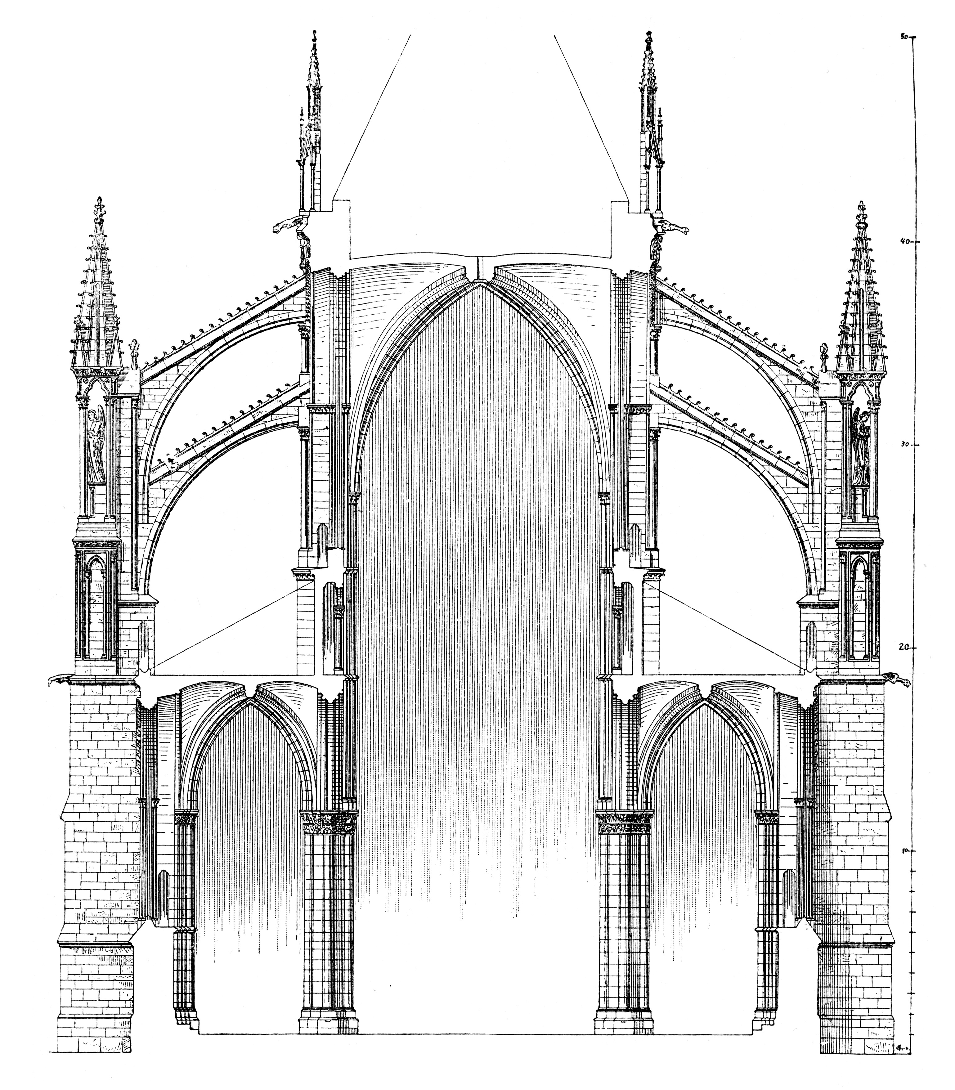 Querschnitt der Kathedrale von Reims. Quelle: Wilhelm Lübke, Max Semrau: Grundriß der Kunstgeschichte. Paul Neff Verlag, Esslingen, 14. Auflage 1908. Public Domain